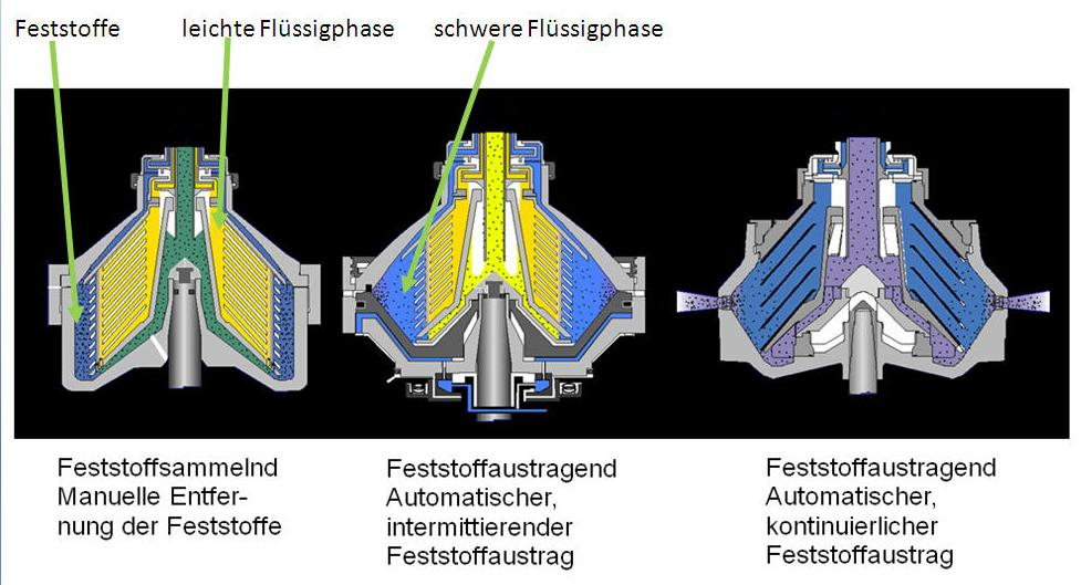 Drei Feststoffaustragsvarianten eines Tellerseparators